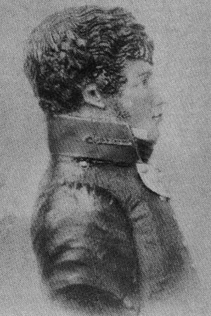 Gottlieb Meinel. Gründungssenior des Corps Palatia München